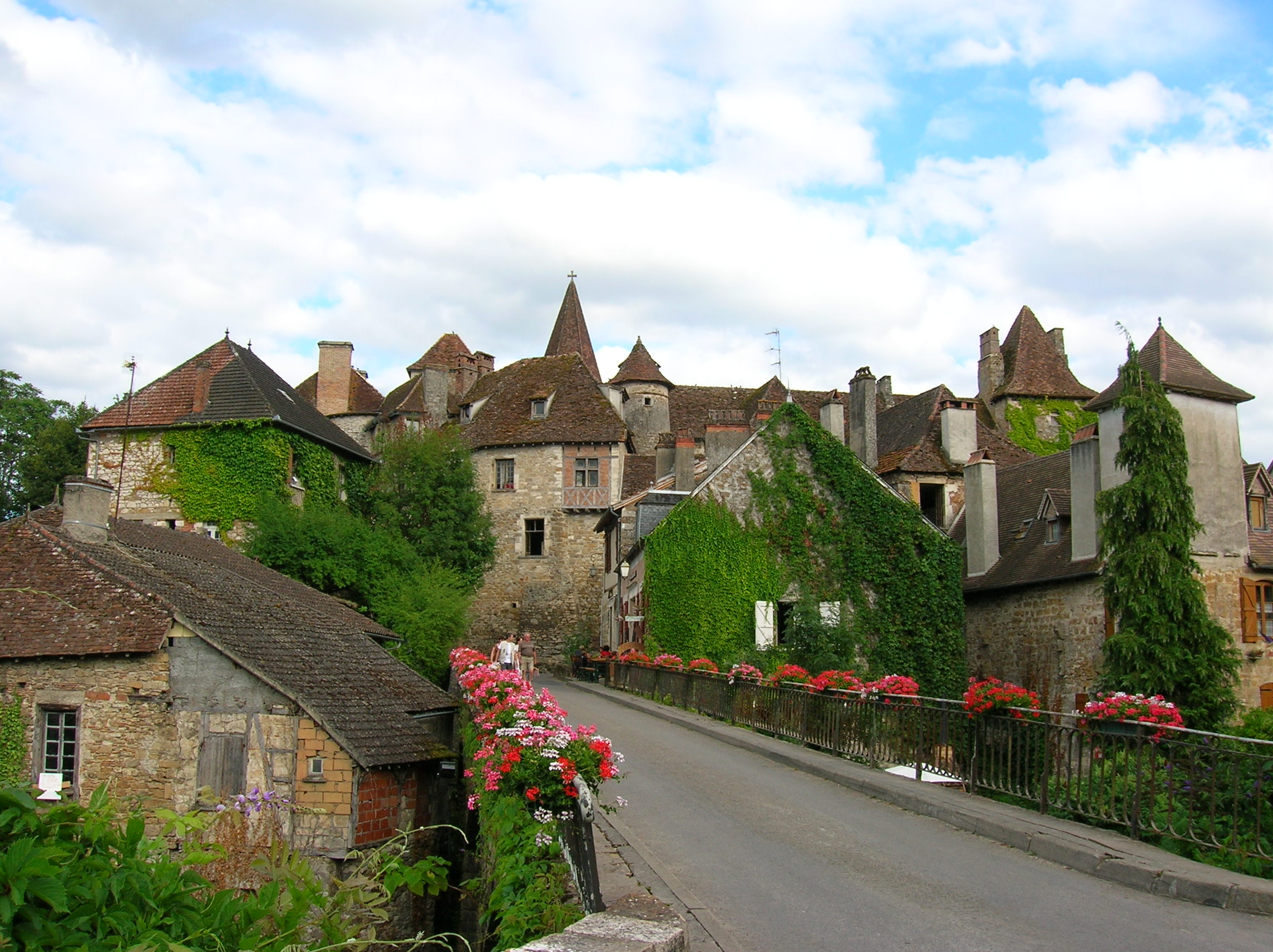 Vue générale de Carennac depuis le pont